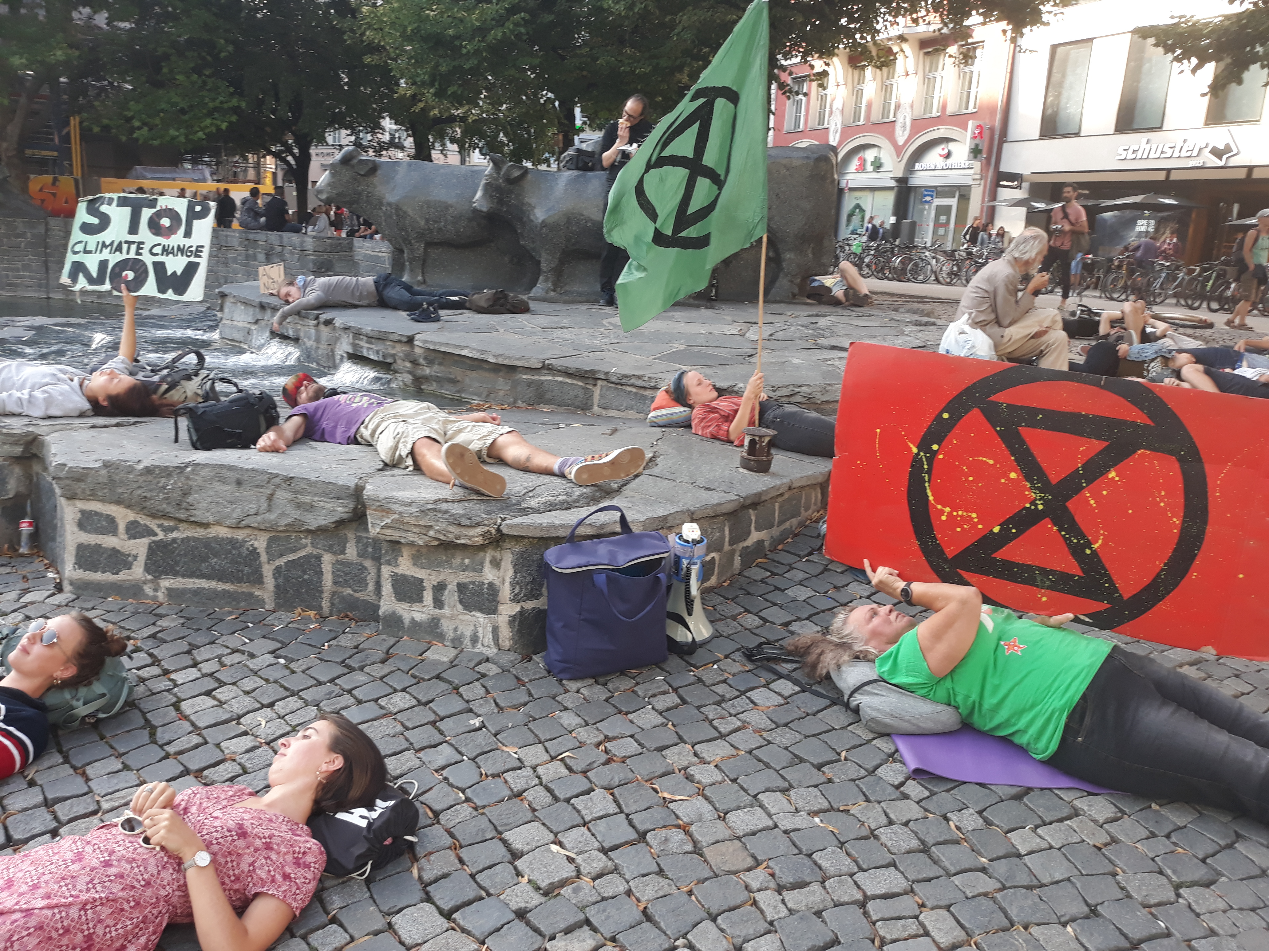 "die In" von Extinction Rebellion am Münchner Rindermarkt, 2019-08-16